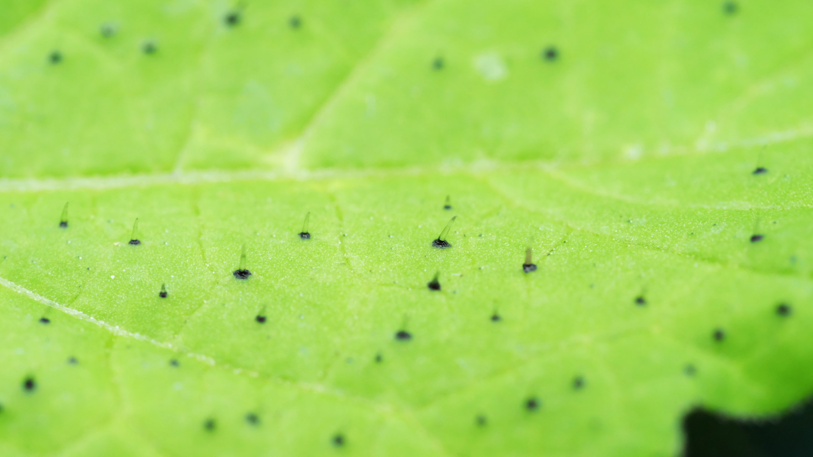 Oberseite eines wild gewachsenen Blattes Ende Juni in Berlin mit schwarzen Punkten und durchsichtigen Zapfen. Die schwarzen Flecke haben einen Durchmesser von 0,1 bis 0,3 Millimeter. Die durchsichtigen Zapfen sind bis zu einem Millimeter lang.